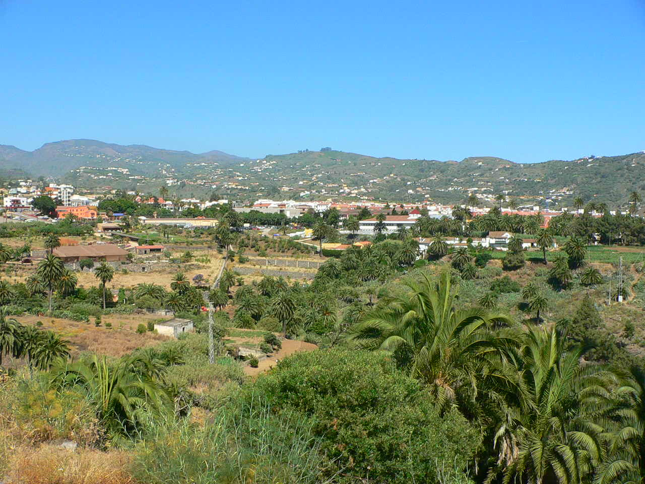 Vista General de Santa Brígida y algunos barrios